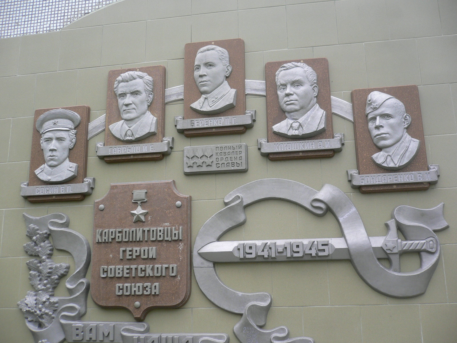 Мемориальная доска на здании школы № 12 города Орехово-Зуево Московской области